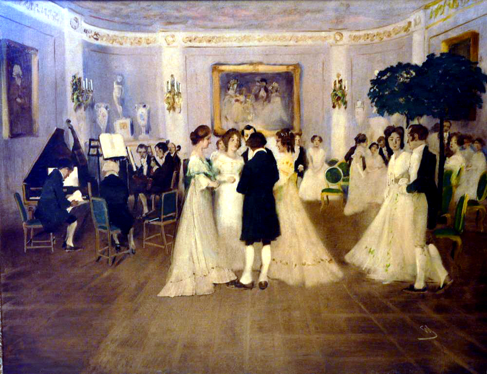 Im Ballsaal. Öl auf Platte, unten rechts monogrammiert "WS" (in Ligatur), 73 x 94 cm.